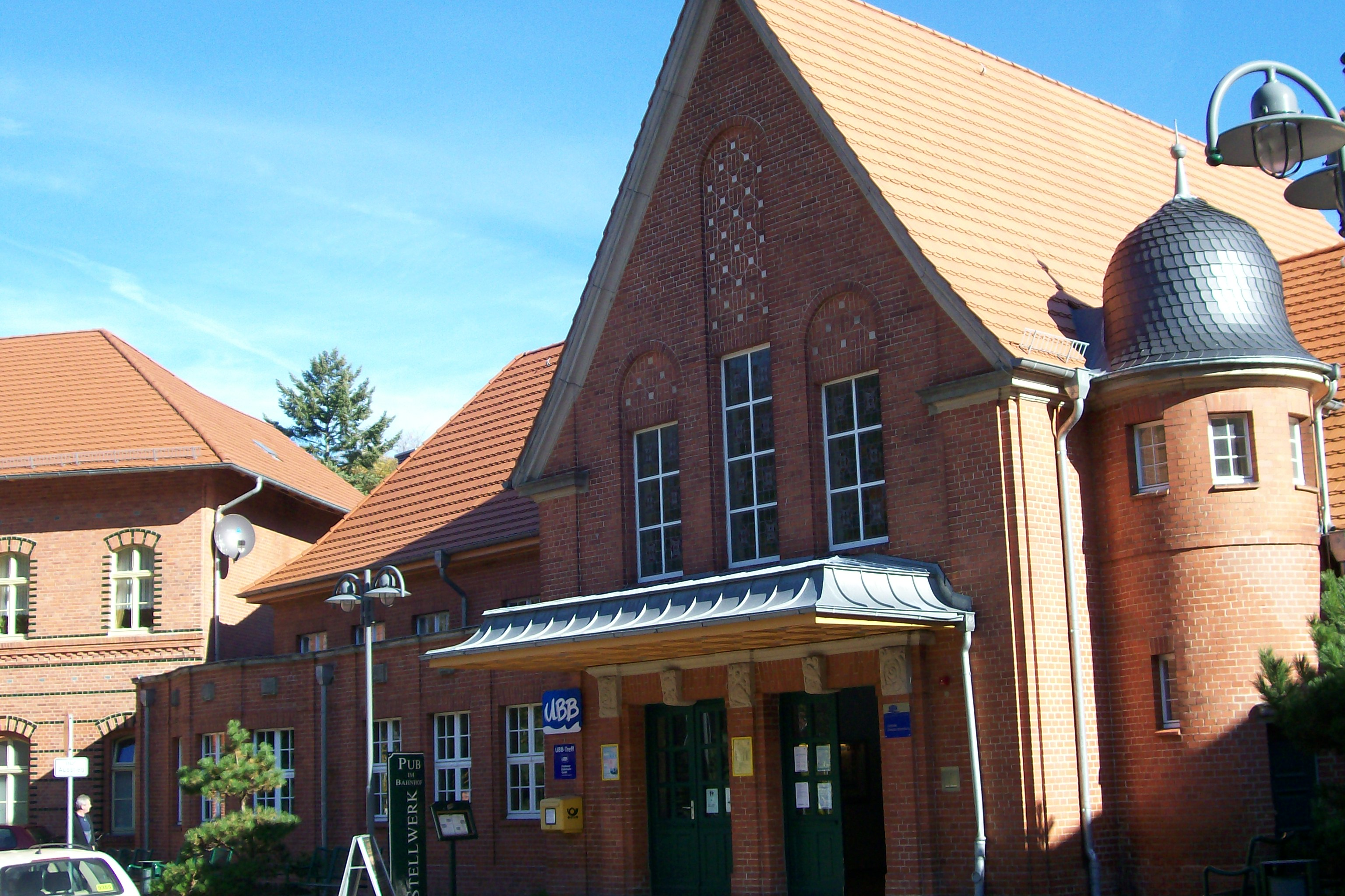 Bahnhof Heringsdorf, erbaut 1894, Bahnhof der Userdomer Bäderbahn in Heringsdorf, Insel Usedom